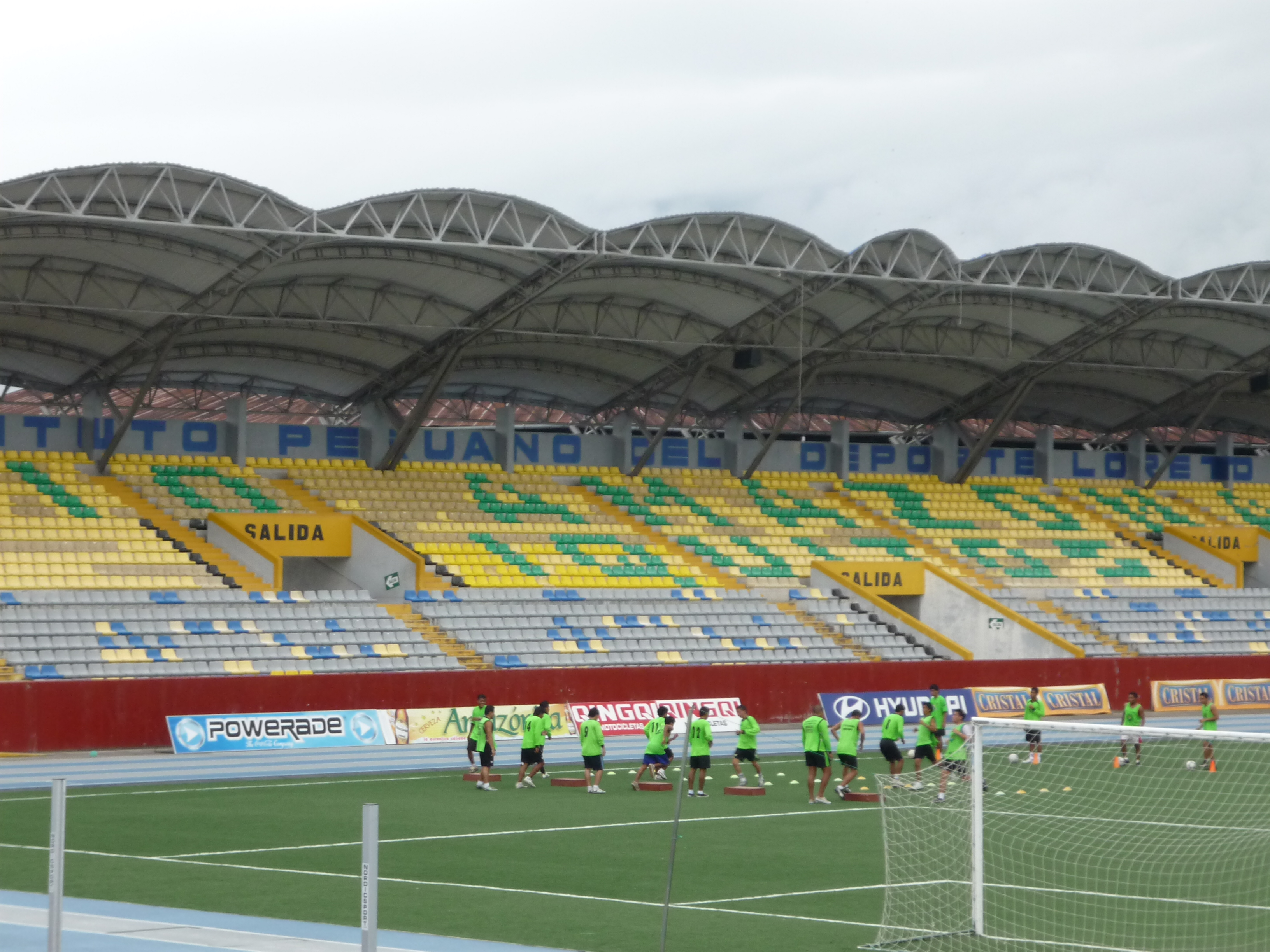 Estadio Max Agustin